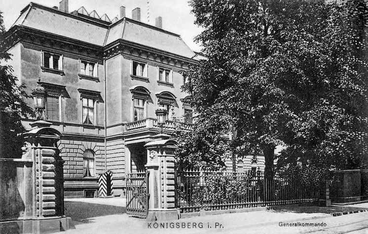 Fotografie des Generalkommandos Königsberg